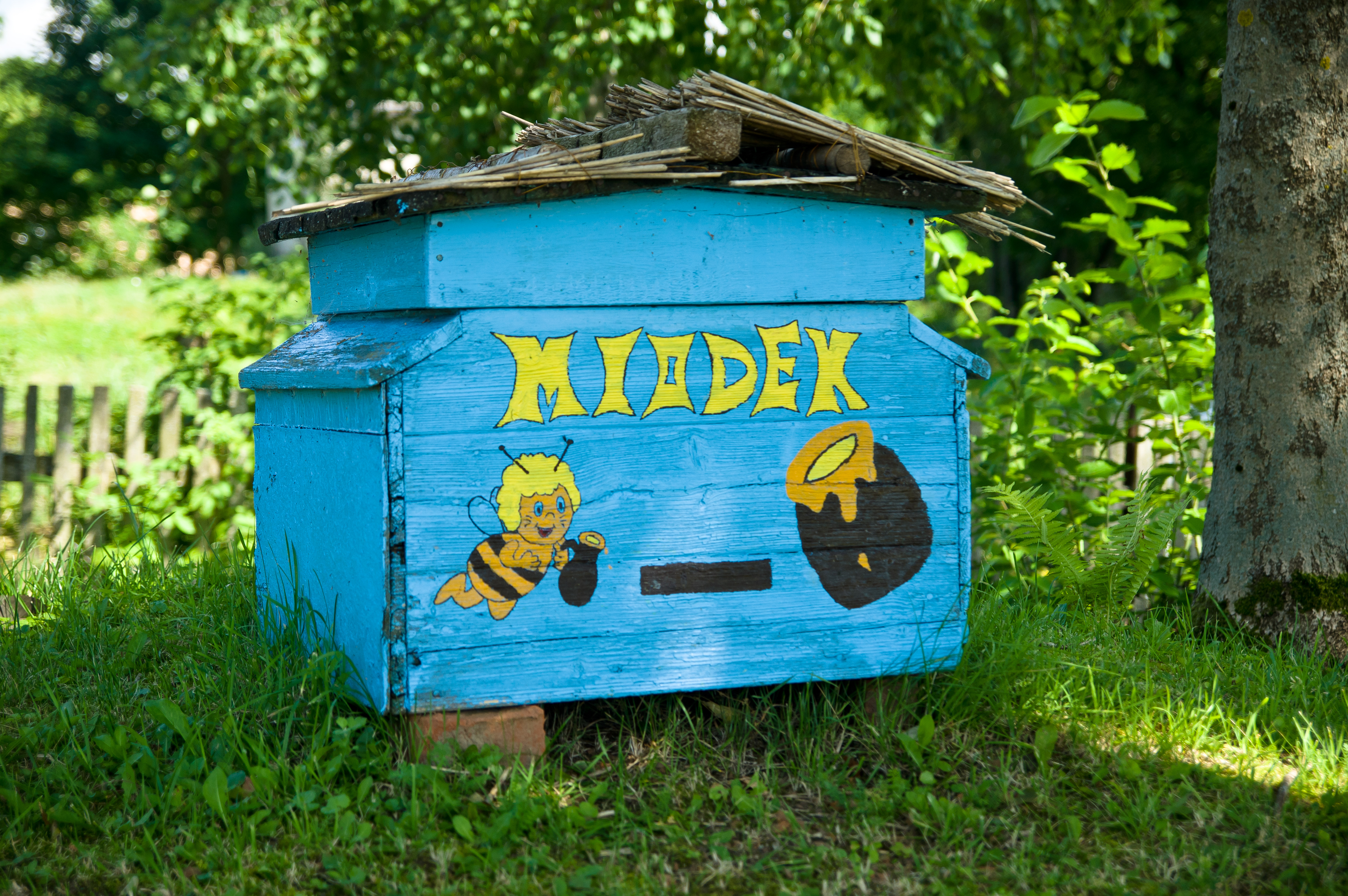 Dekoracyjny ul w okolicach kaplicy w Janikowie (województwo warmińsko-mazurskie).